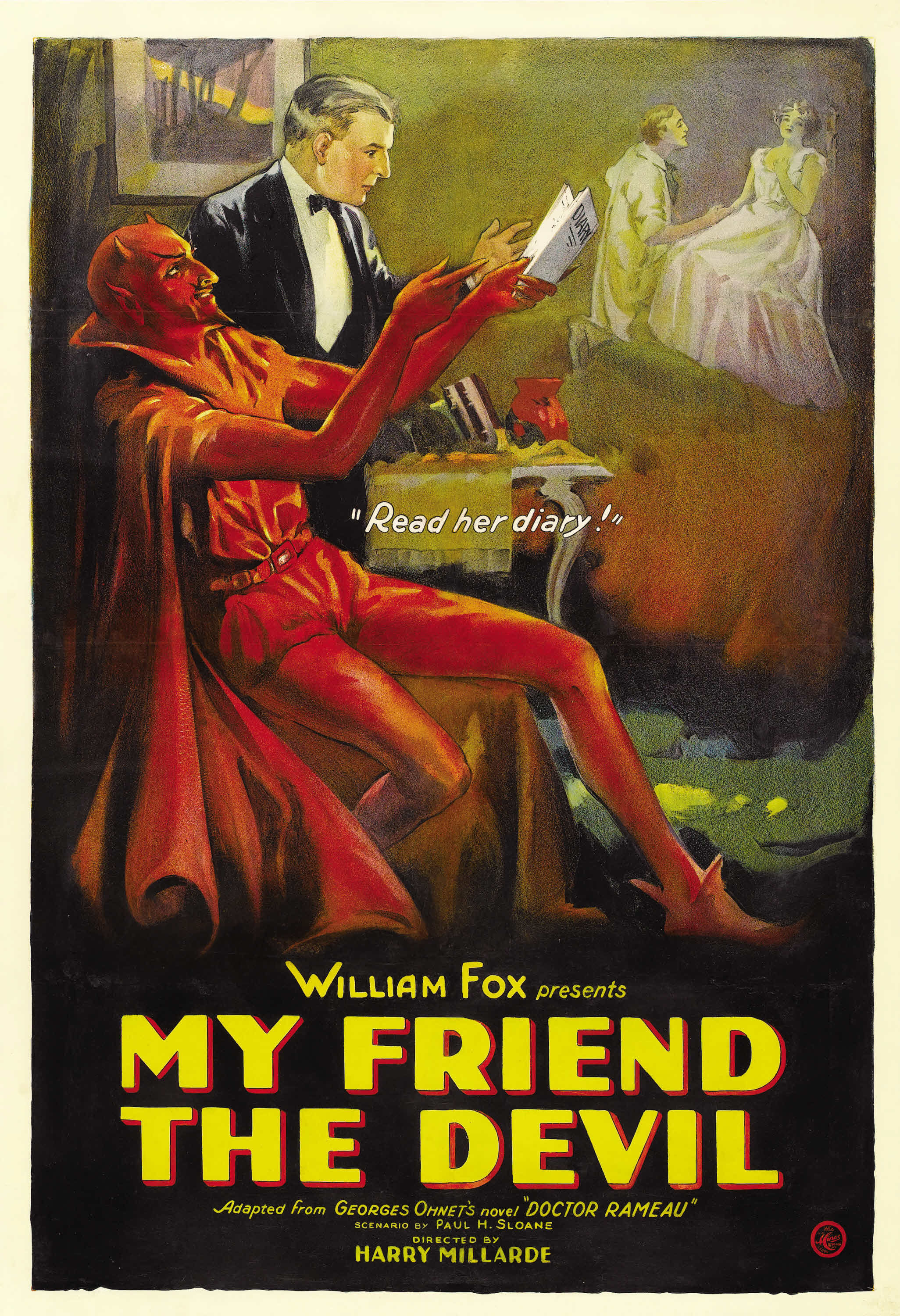 Movie poster